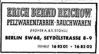 Erich Bernd Reichow, früher A. & S. Segall, Pelzwarenfabrik - Rauchwaren. Berlin SW 68, Seydelstraße 8-9.